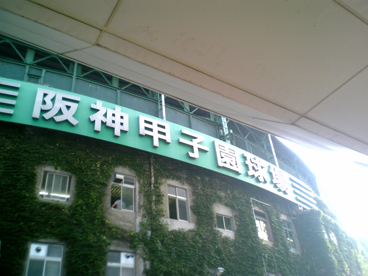 Koshien Stadium facade甲子園